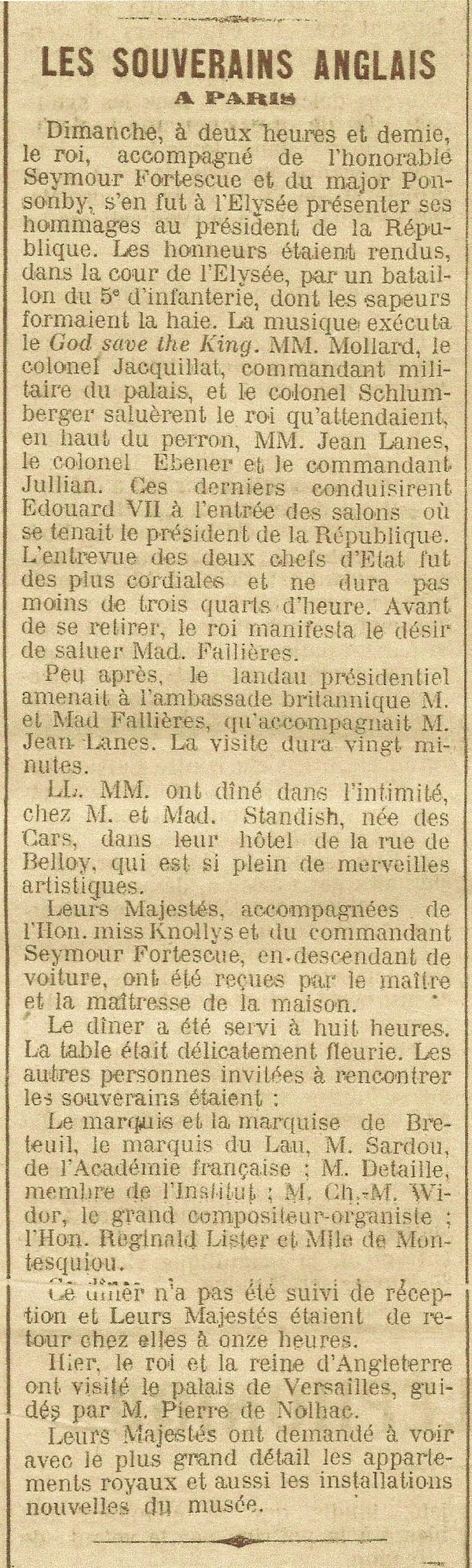 Article du Journal du Loiret, du mercredi 6 février 1907, n° 30, page 2, à propos de la visite du roi d'Angleterre Édouard VII et de la reine Alexandra, en France. Titre de l'article : « Les souverains anglais à Paris ». Le journaliste mentionne également la visite du couple royal chez Lord Henry Standish et son épouse Lady Hélène Standish, née de Pérusse des Cars, à Paris.